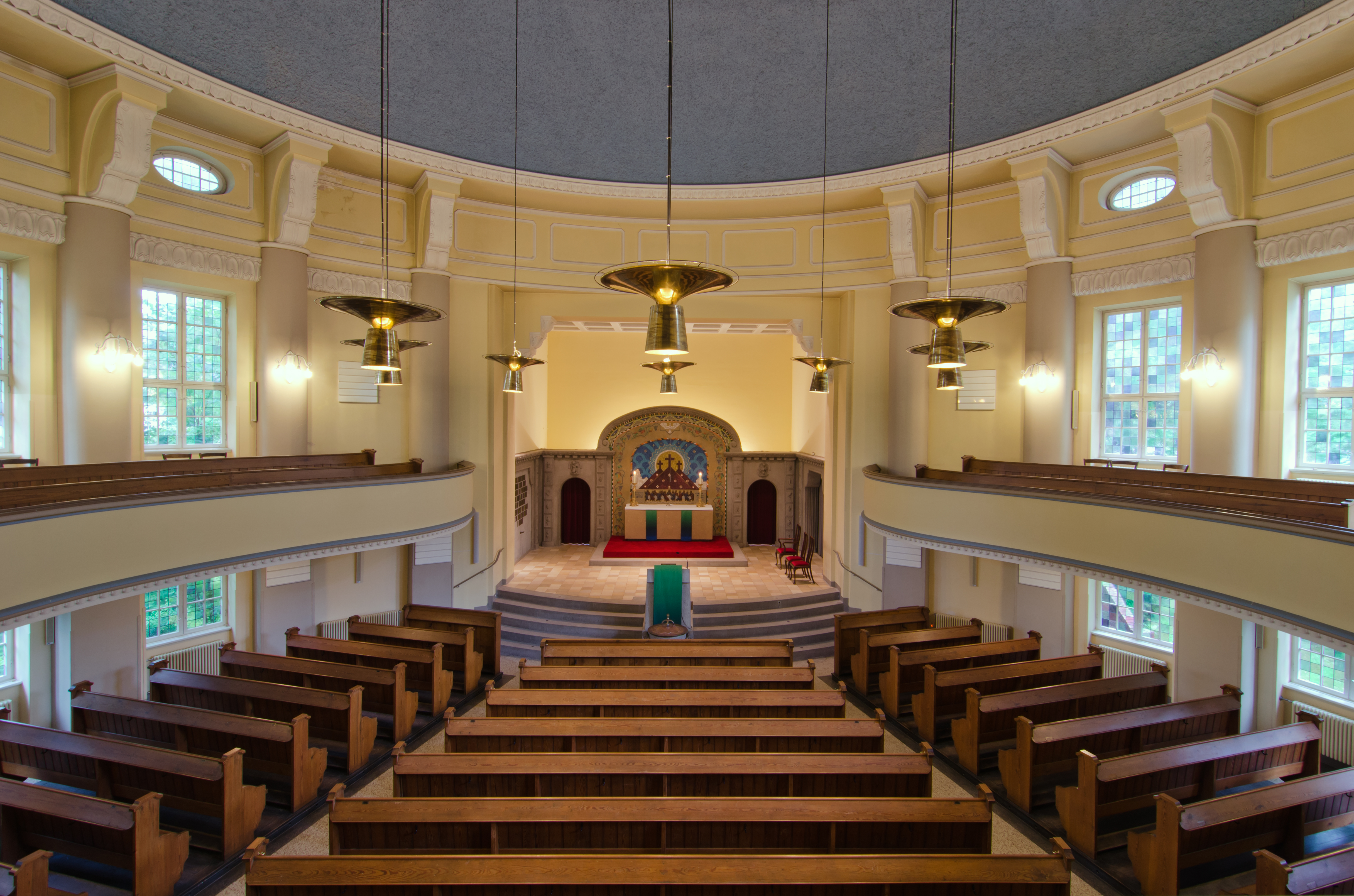 Hamburg Auferstehungskirche Barmbek, Blick zum Altar